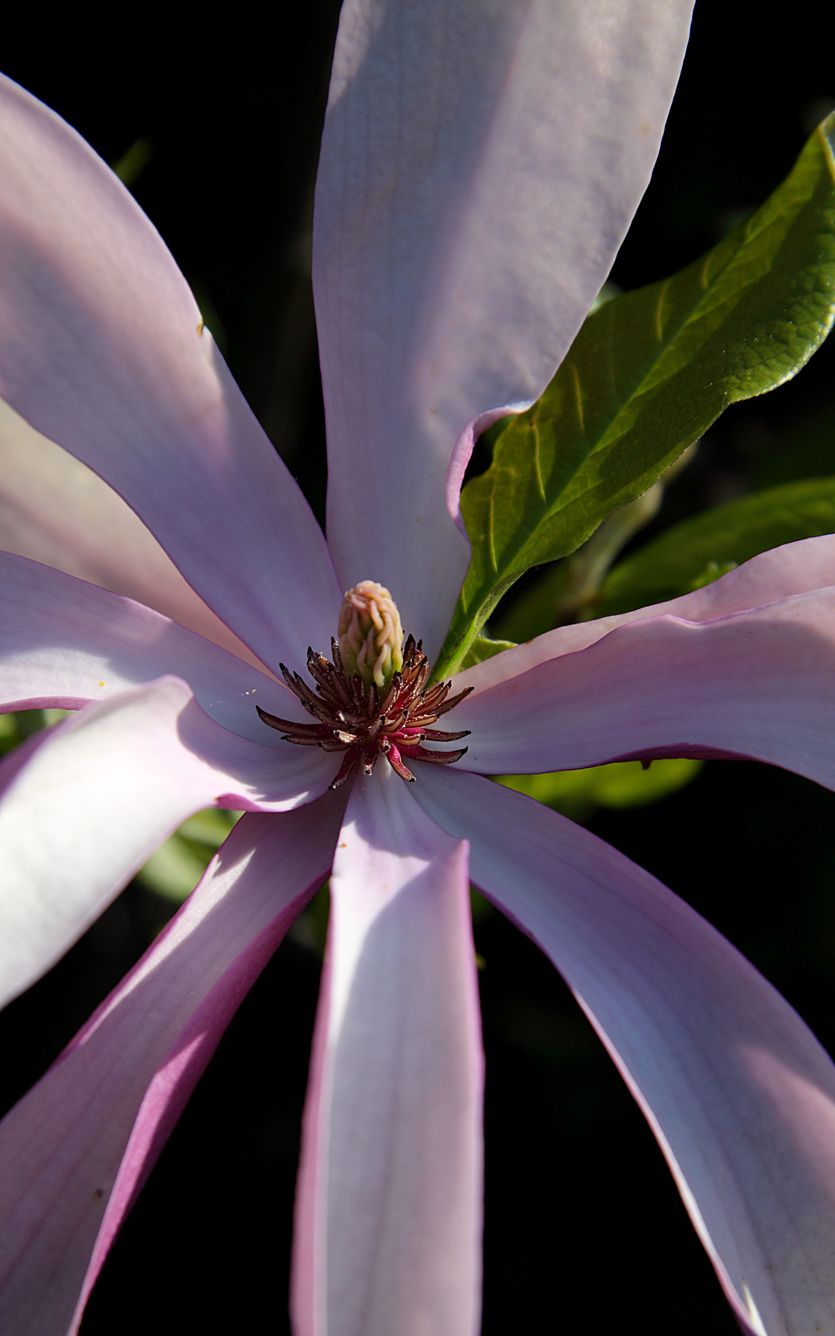 Magnolia liliiflora (Purpur-Magnolie), Blüte in der Detailansicht